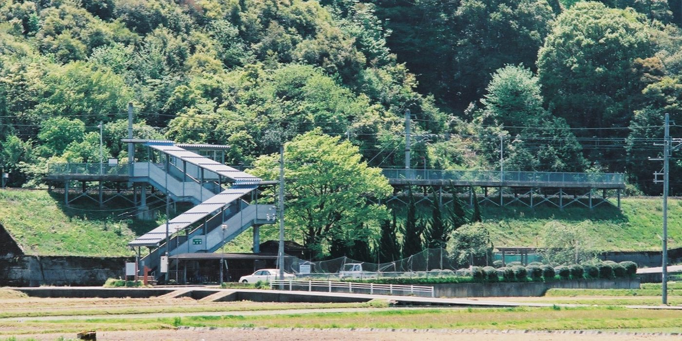 北近畿タンゴ鉄道宮福線喜多駅